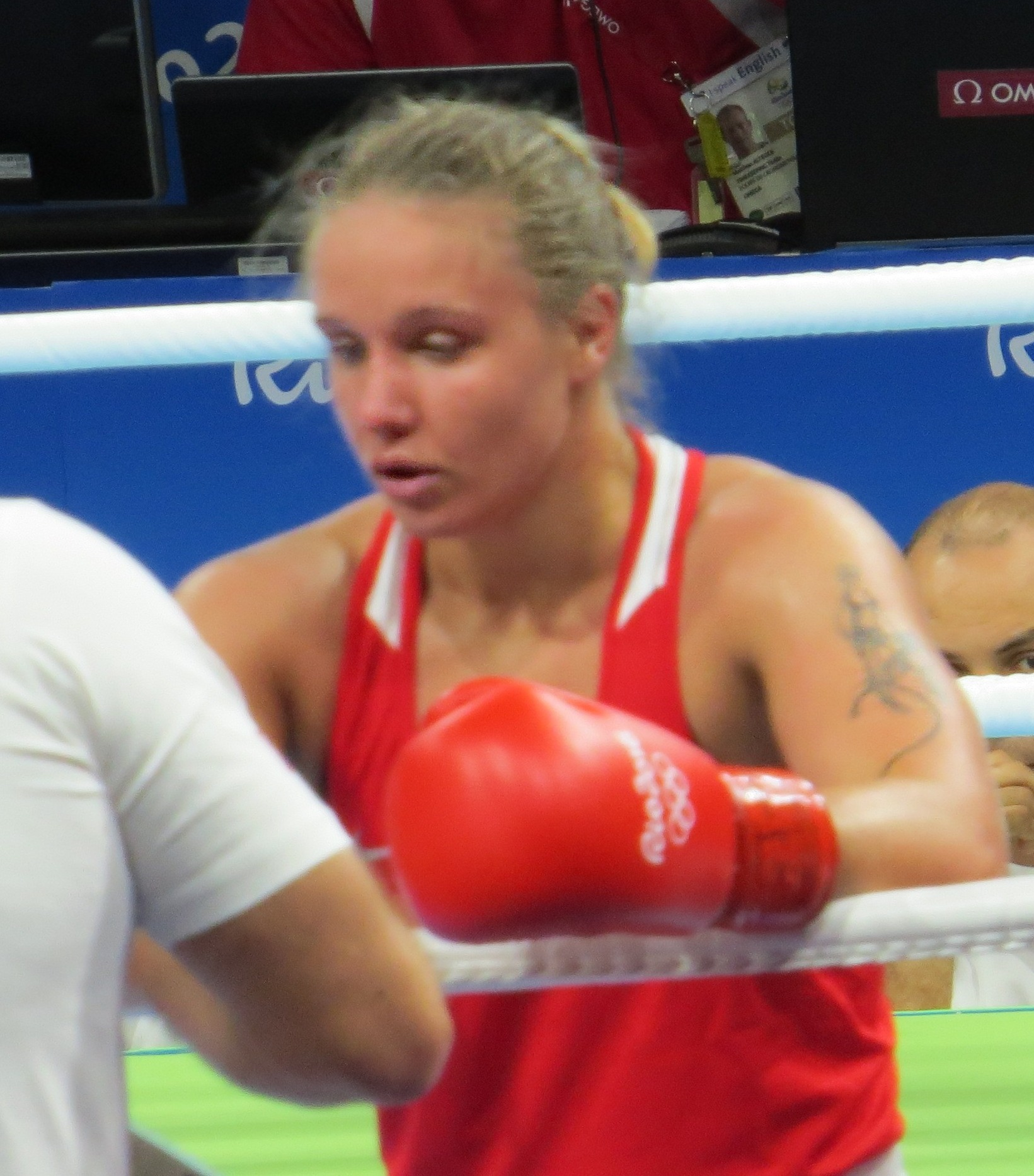 Yaroslava Yakushina